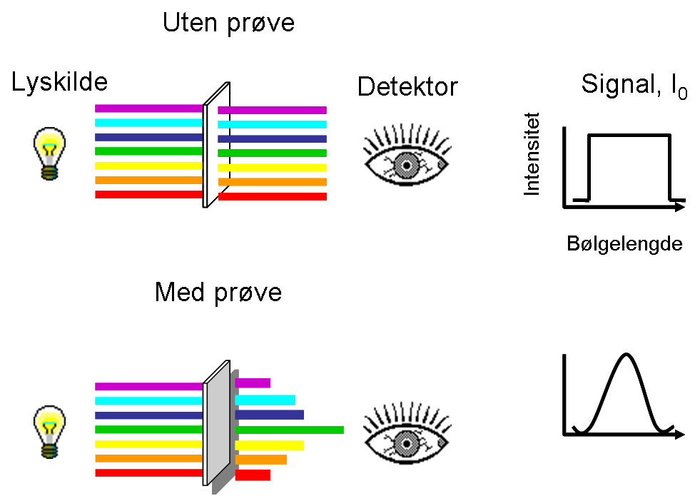 prinssipp for transmittansmåling i infrarød spektroskopi